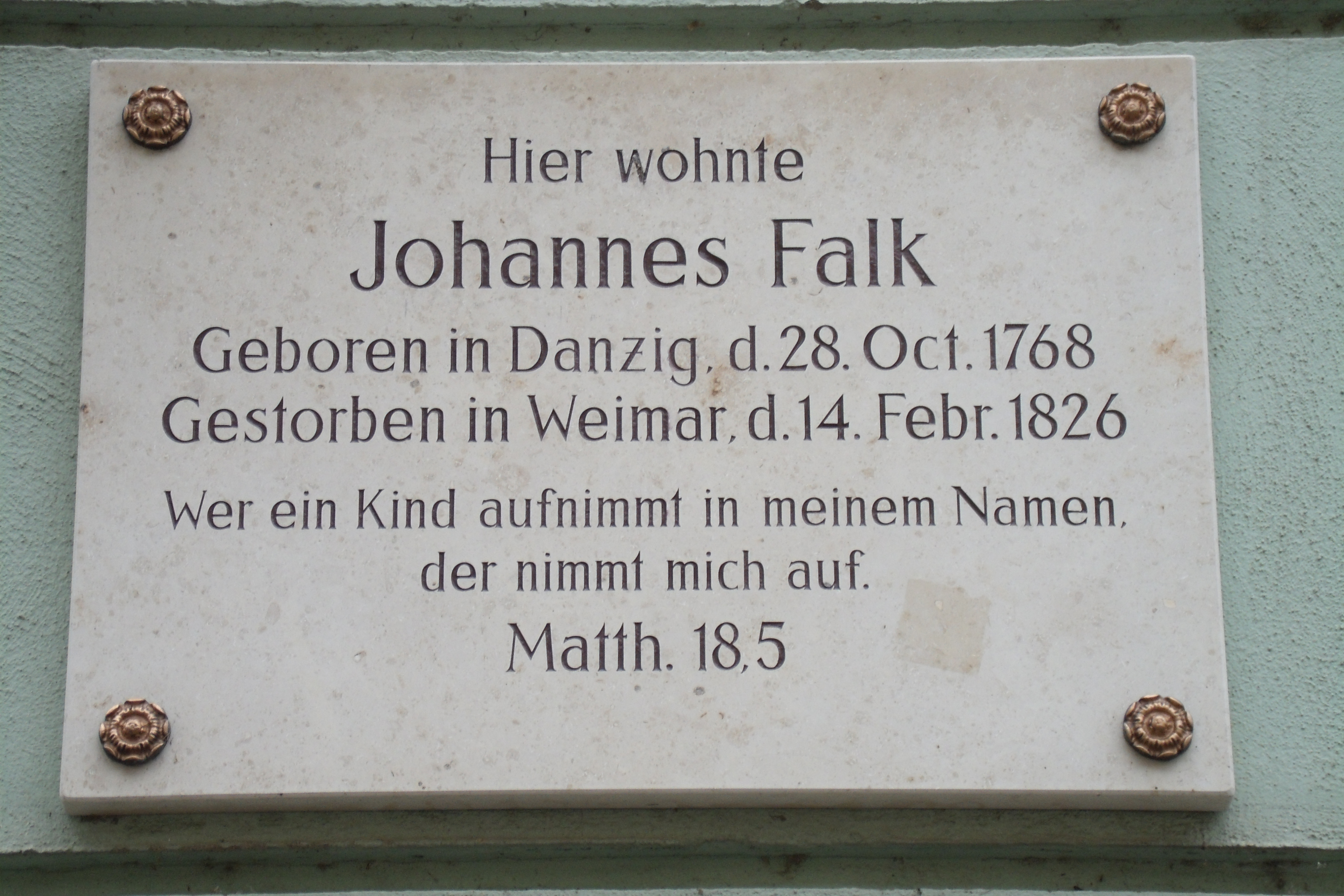 Johannes Daniel Falk Tafel am Lutherhof Eingang Marstallstraße in Weimar